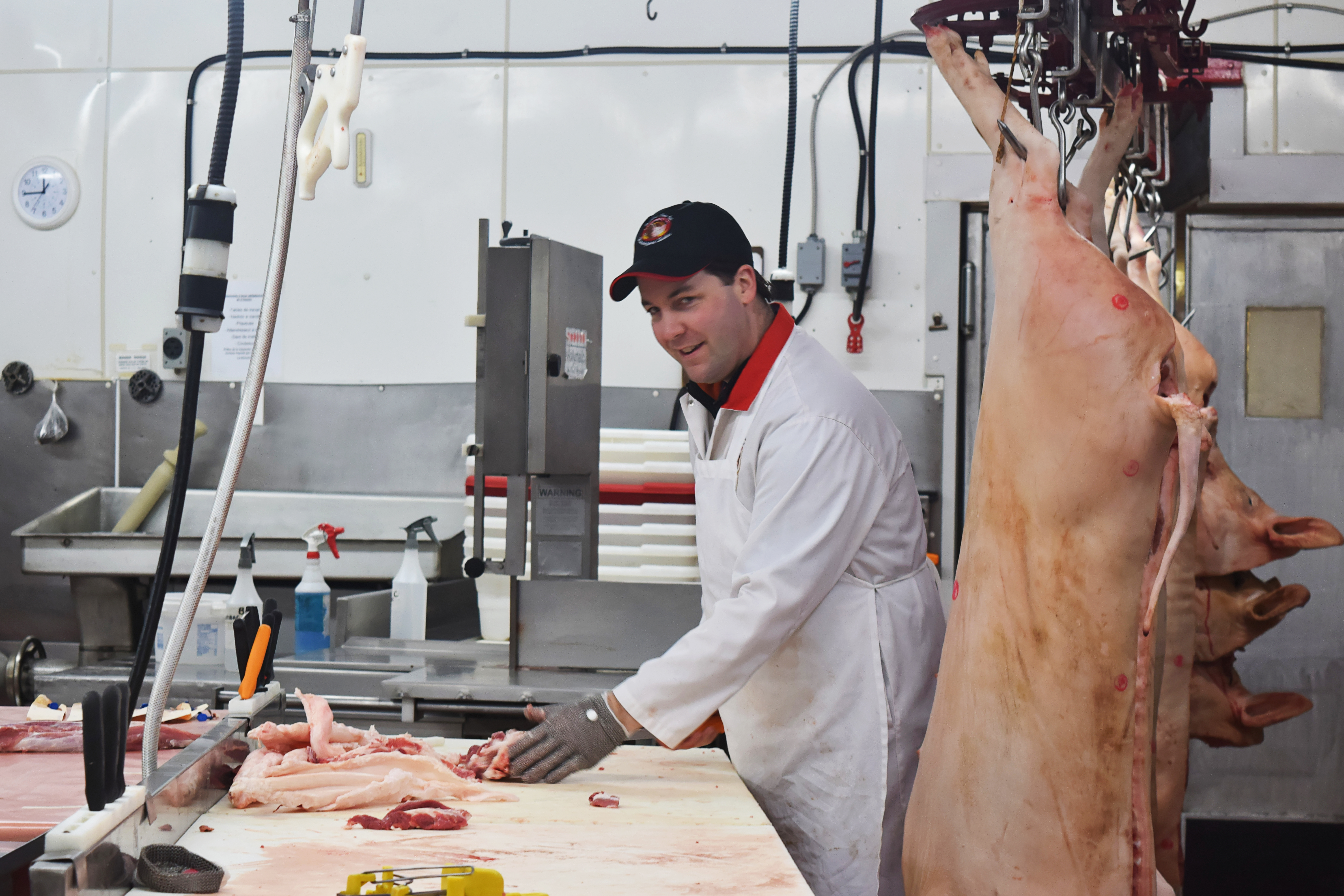 Fleischerei in Kanada.